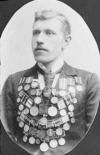 Peder Østlund, norsk skøyteløper, verdensmester 1898 og 1899 og europamester 1899 og 1900